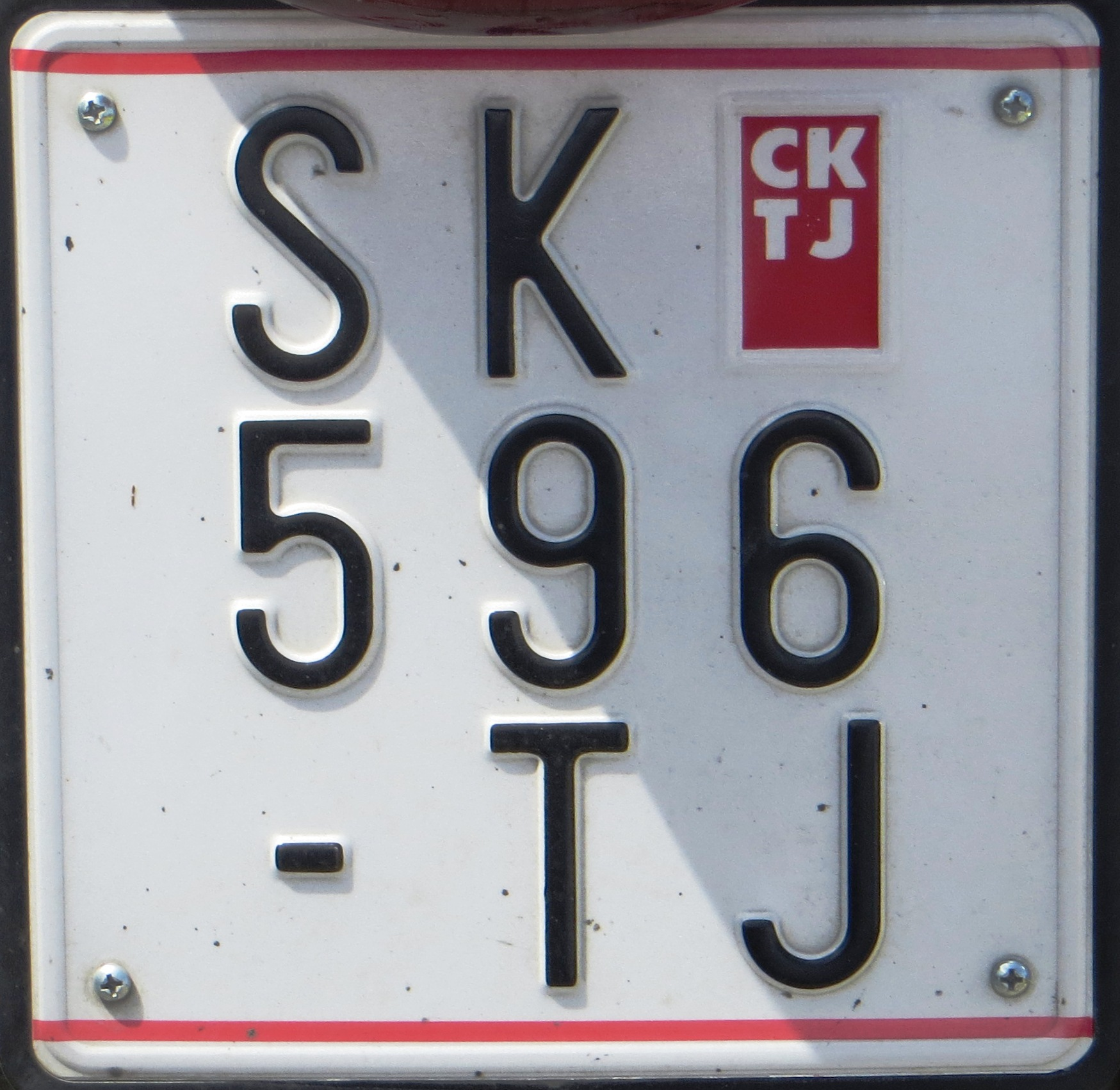 Oud motorkenteken Macedonië